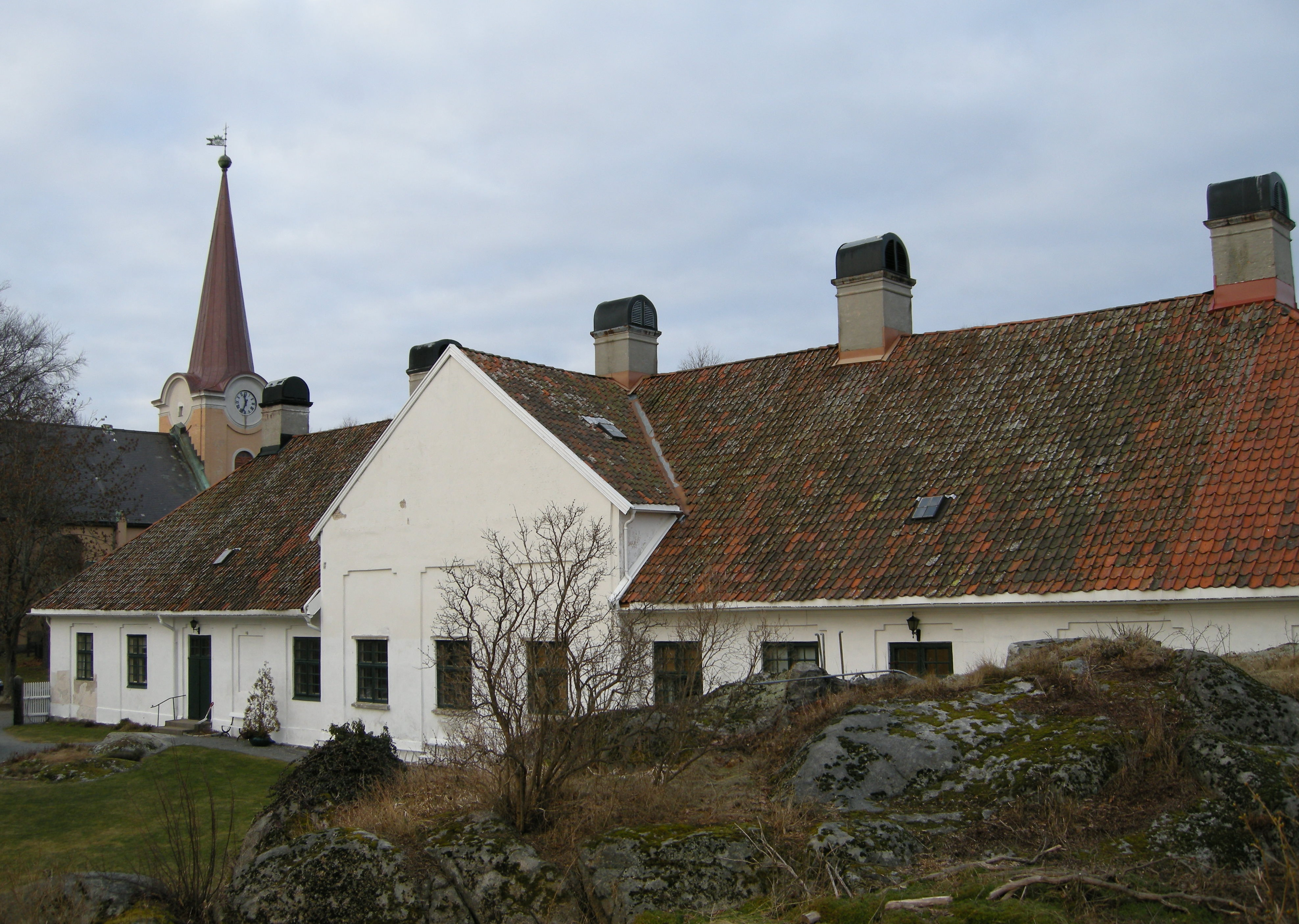 Baksiden av Laurvig Hospital i Larvik